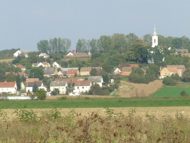 Csikóstőttős látképe (Tolna megye)